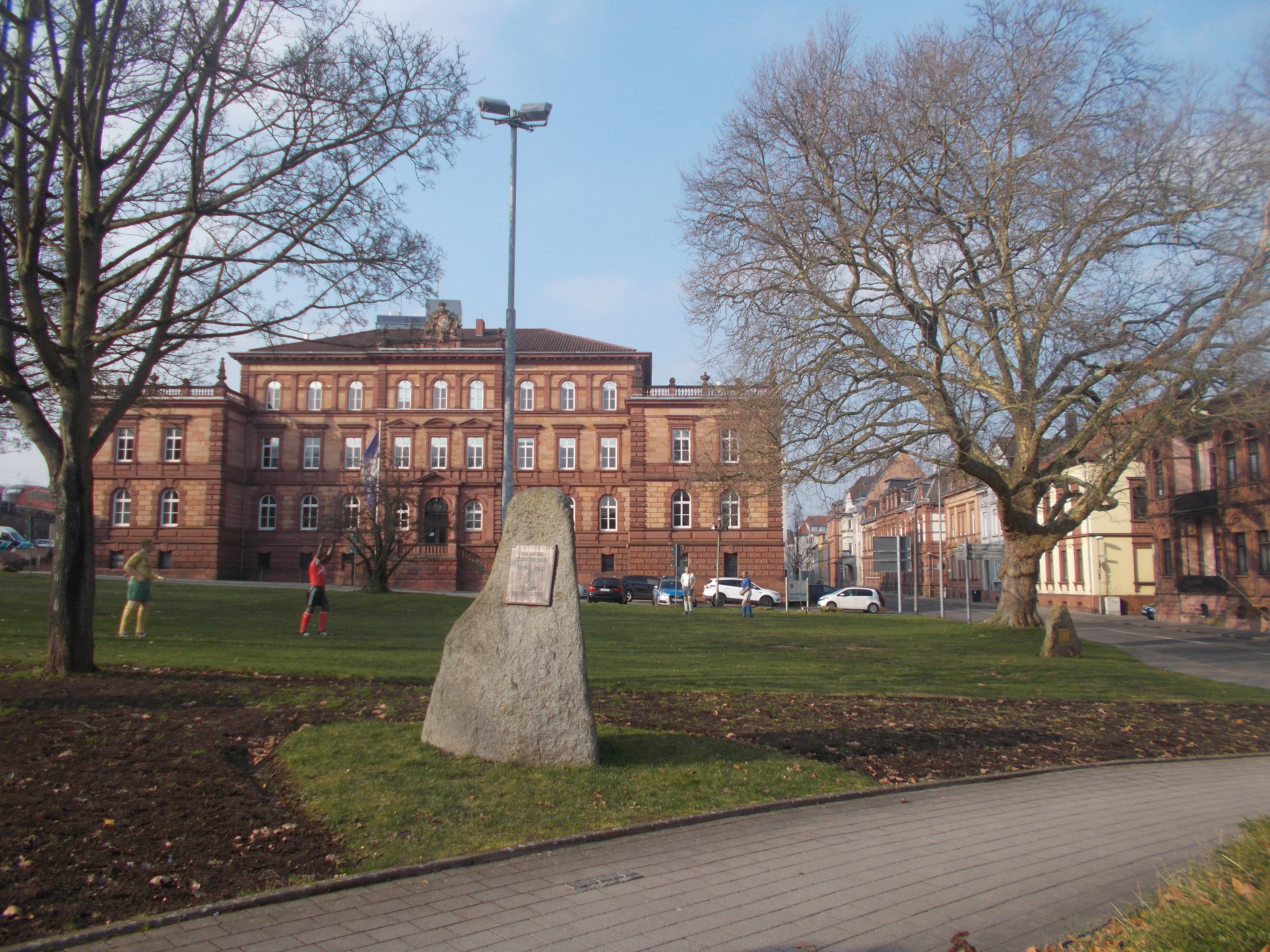 ehemaliges Königliches Bezirkskommando, heute Polizeipräsidium; schlossartiger, zwei- und dreigeschossiger neubarocker Mehrflügelbau, Sandsteinquaderbau mit Walmdach, 1893, Architekt Ludwig Ritter von Stempel